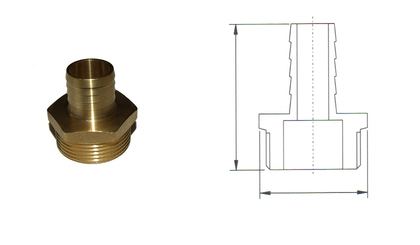 Штуцер для соединения водяных шлангов.